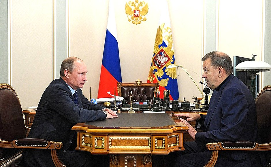 Генеральный директор Государственного академического Большого театра В. Г. Урин на встрече с Президентом РФ В. В. Путиным в Ново-Огарёво, 5 ноября 2013 года.